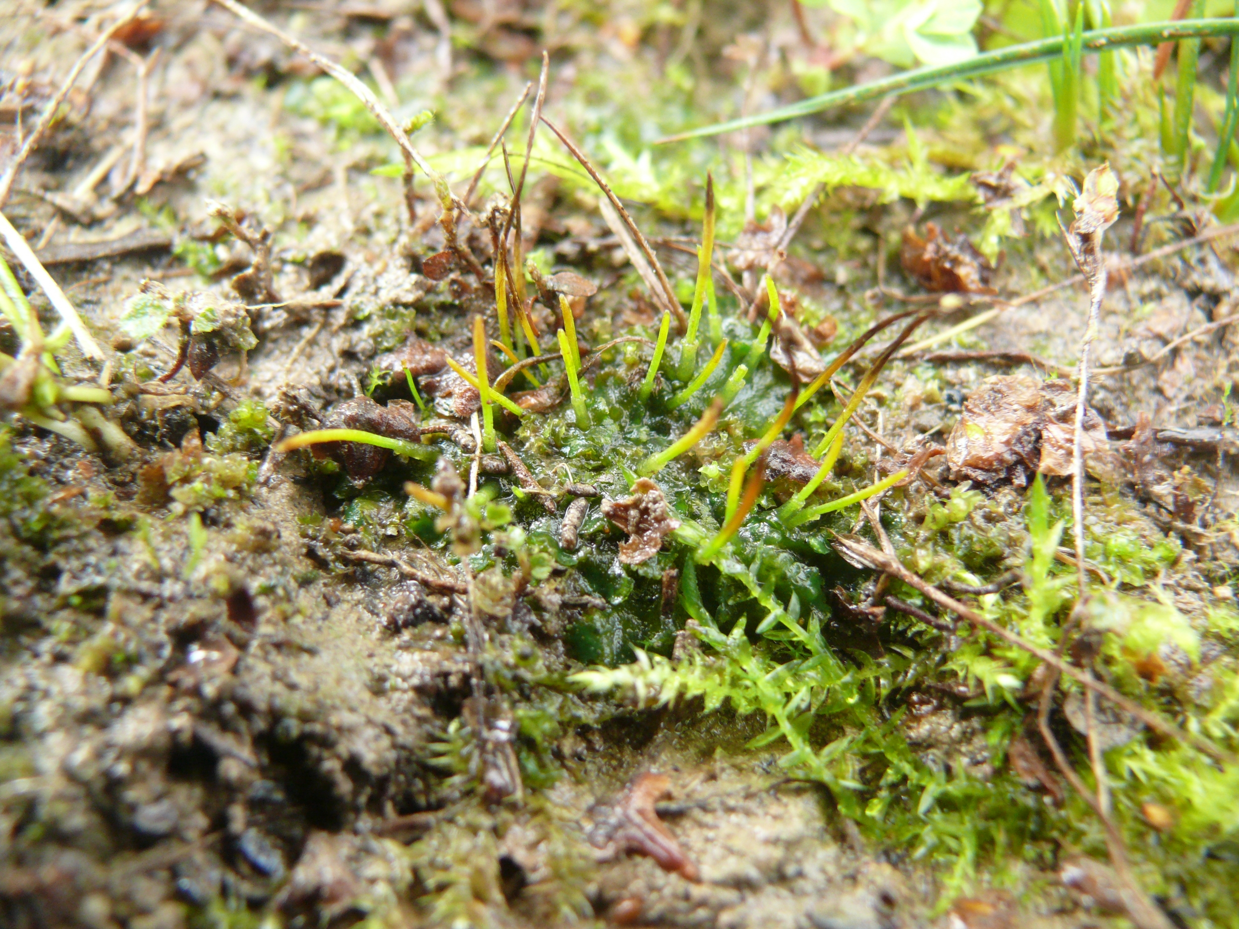 Phaeoceros carolinianus, Schwäbisch-Fränkische Waldberge